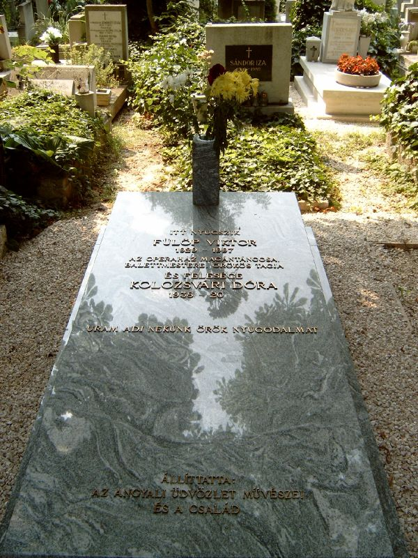 Fülöp Viktor (Budapest, 1929. február 9. – 1997. július 13.) táncos, balettmester sírja Budapesten. Farkasréti temető: 31-1-107